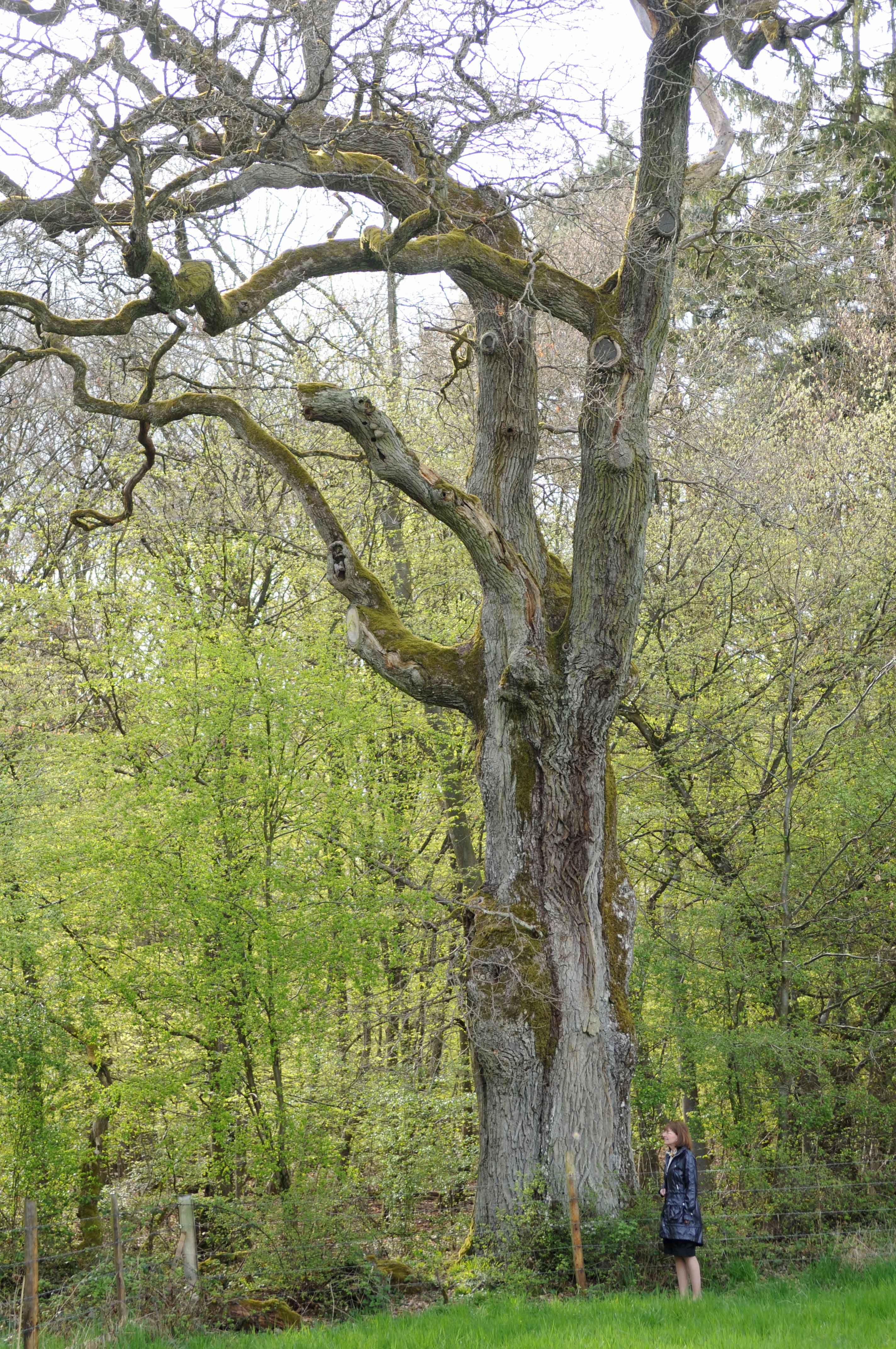 Eech zu Lenneng. Eech Lenneg + Kategorie:Gemeng Lenneng